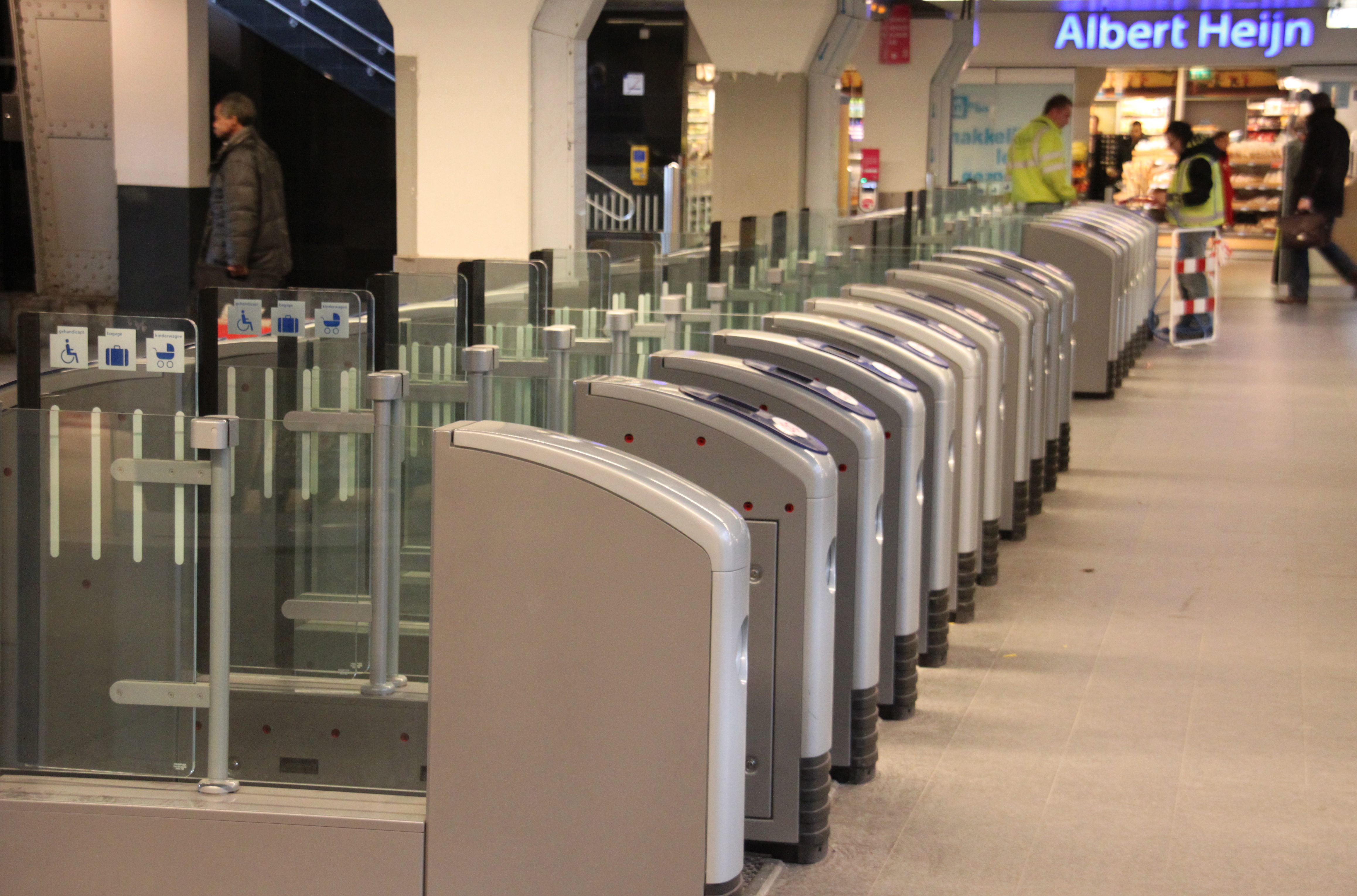 OV-chipkaartpoortjes op het station Amsterdam Centraal, uitgang IJzijde.